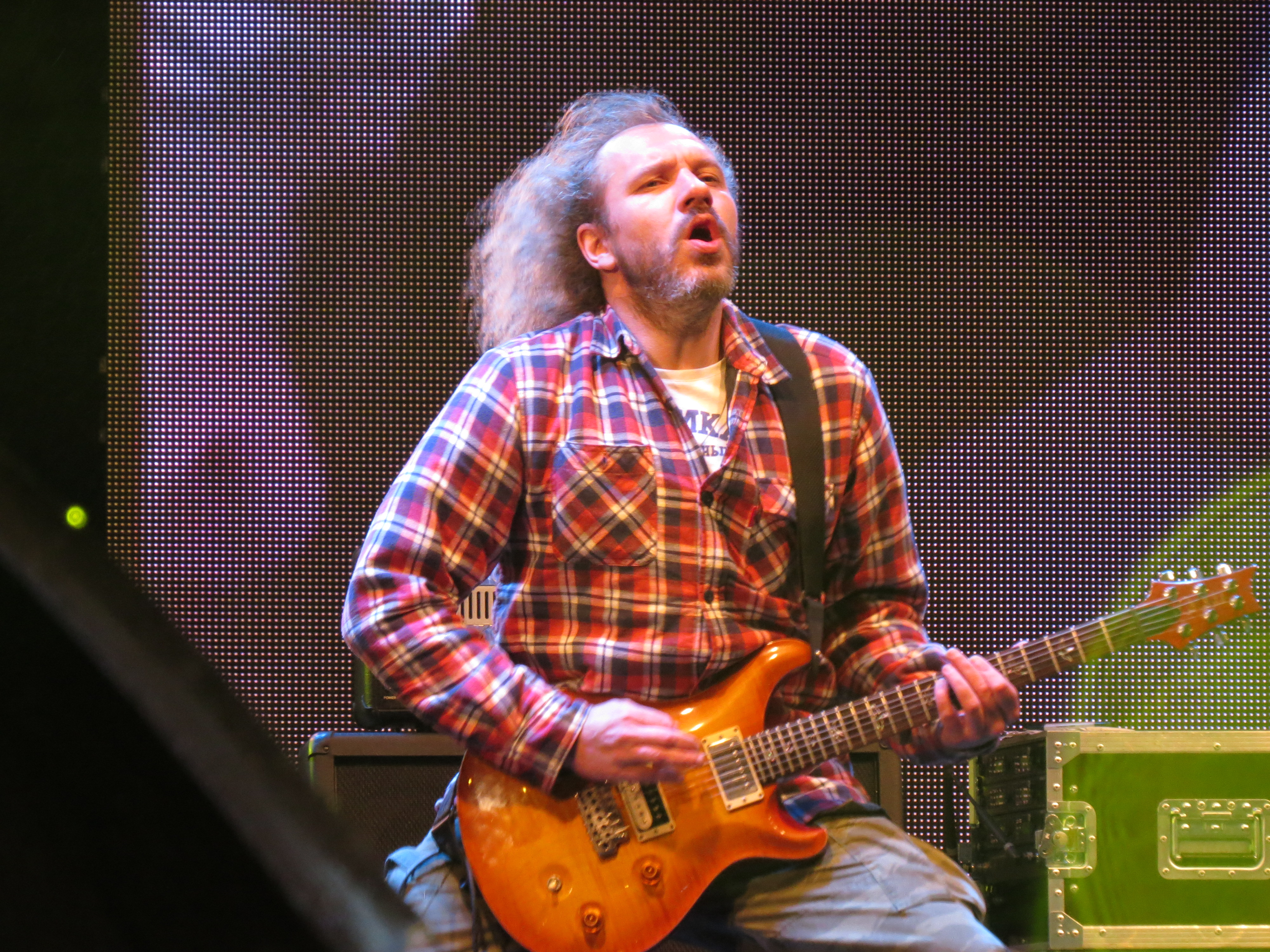 Группа Ляпис Трубецкой на концерте-митинге в поддержку кандидата в мэры Москвы Алексея Навального на проспекте Сахарова 6 сентября 2013 года